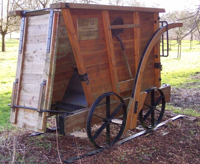 Fahrzeugreplika am Rauendahler Schiebeweg, eine der frühen Eisenbahnen Deutschlands